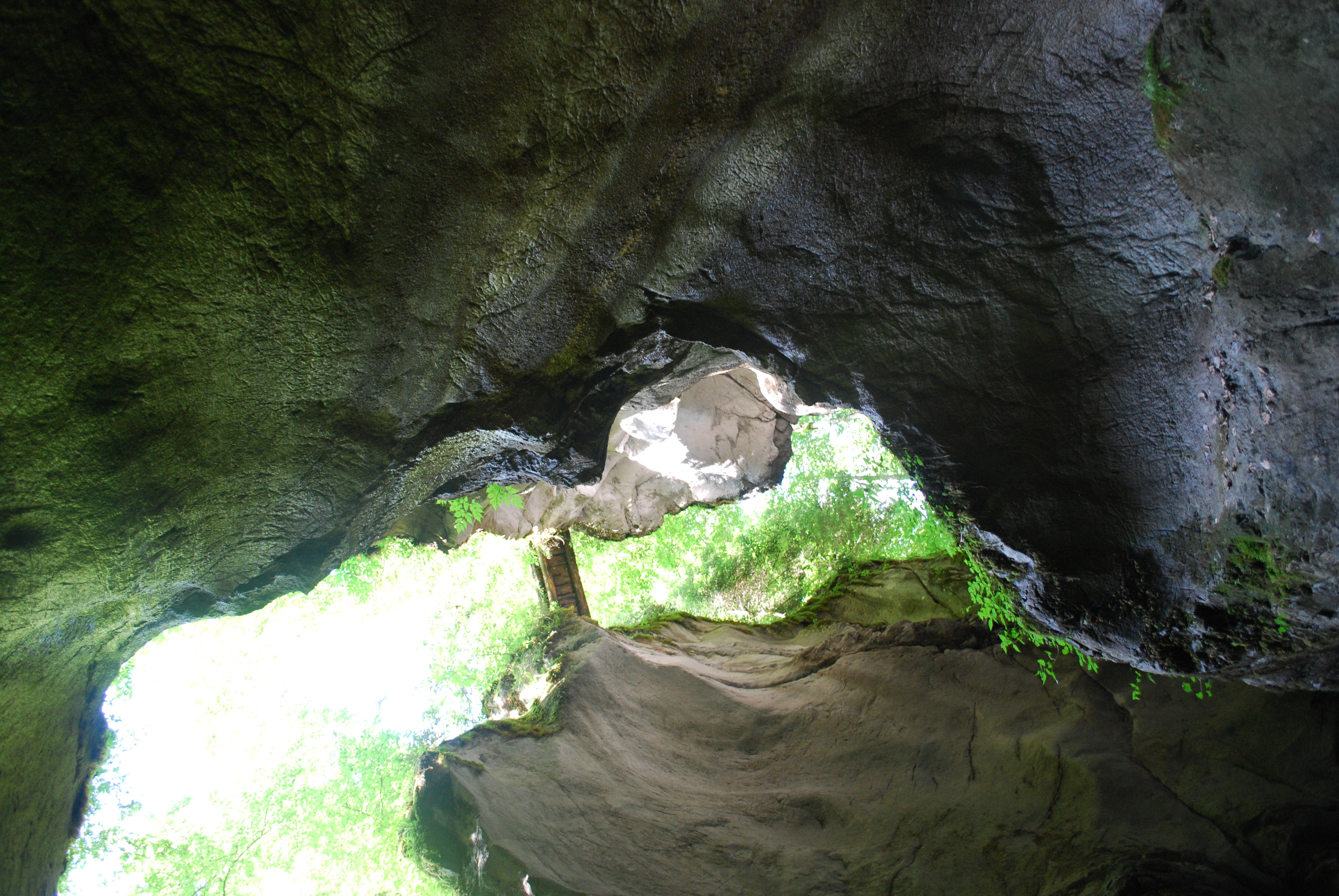 Kijk naar boven in Seisenbergklamm